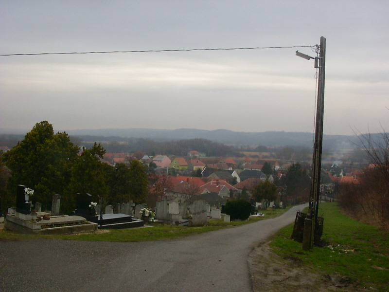 Balf látképe